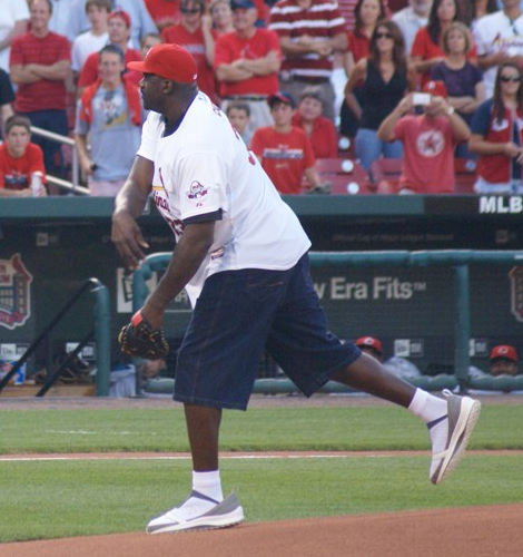 Shaquille O'Neal